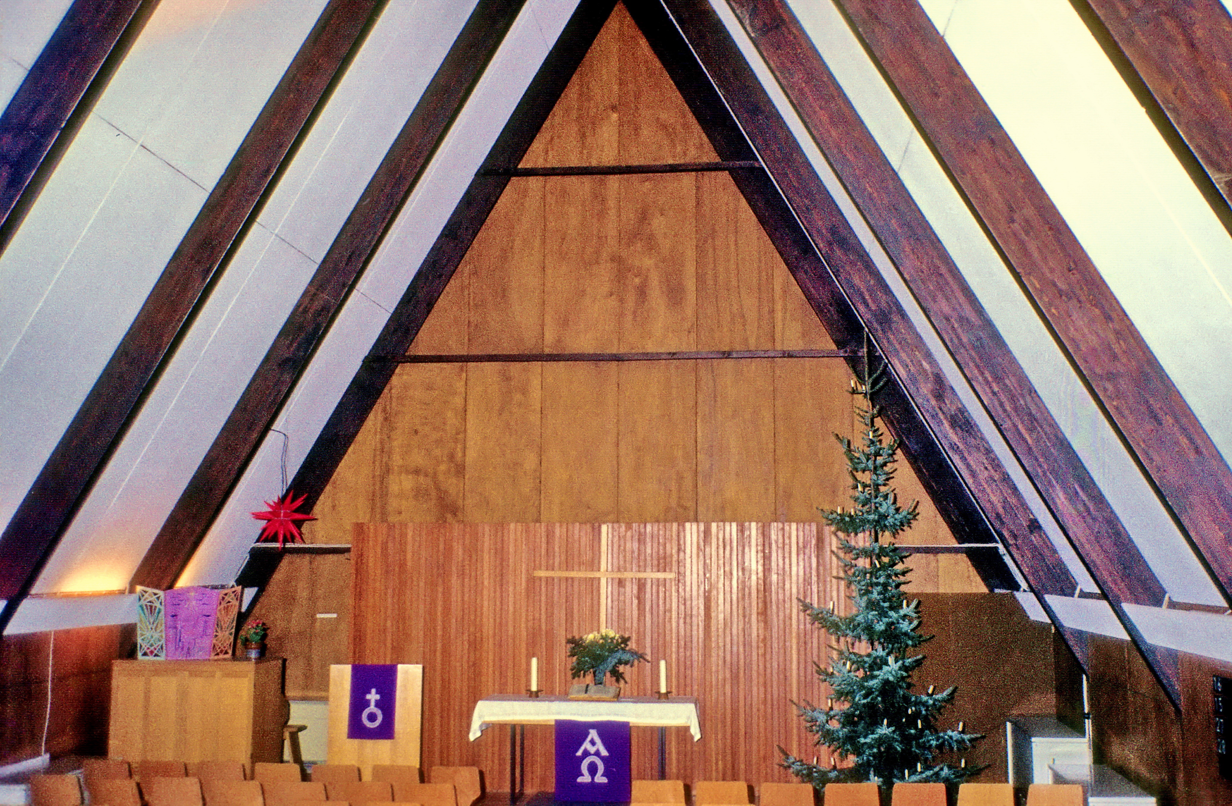 Holzkirche in Bremen-Schönebeck vor 1993. 1993 wurde ein Altarwand mit Passionskreuz eingebaut